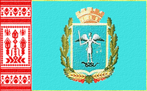 Прапор Кролевецького району